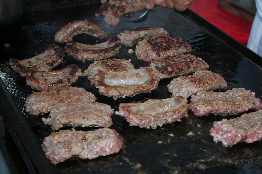 Salamelle